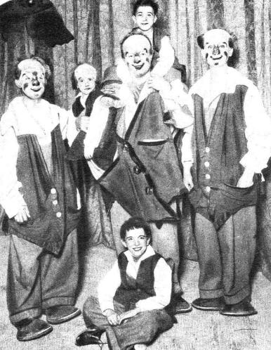 Familia Aragón: Teddy, Nabuconodosorcito, Zampabollos, Gaby, Fofó y Miliki